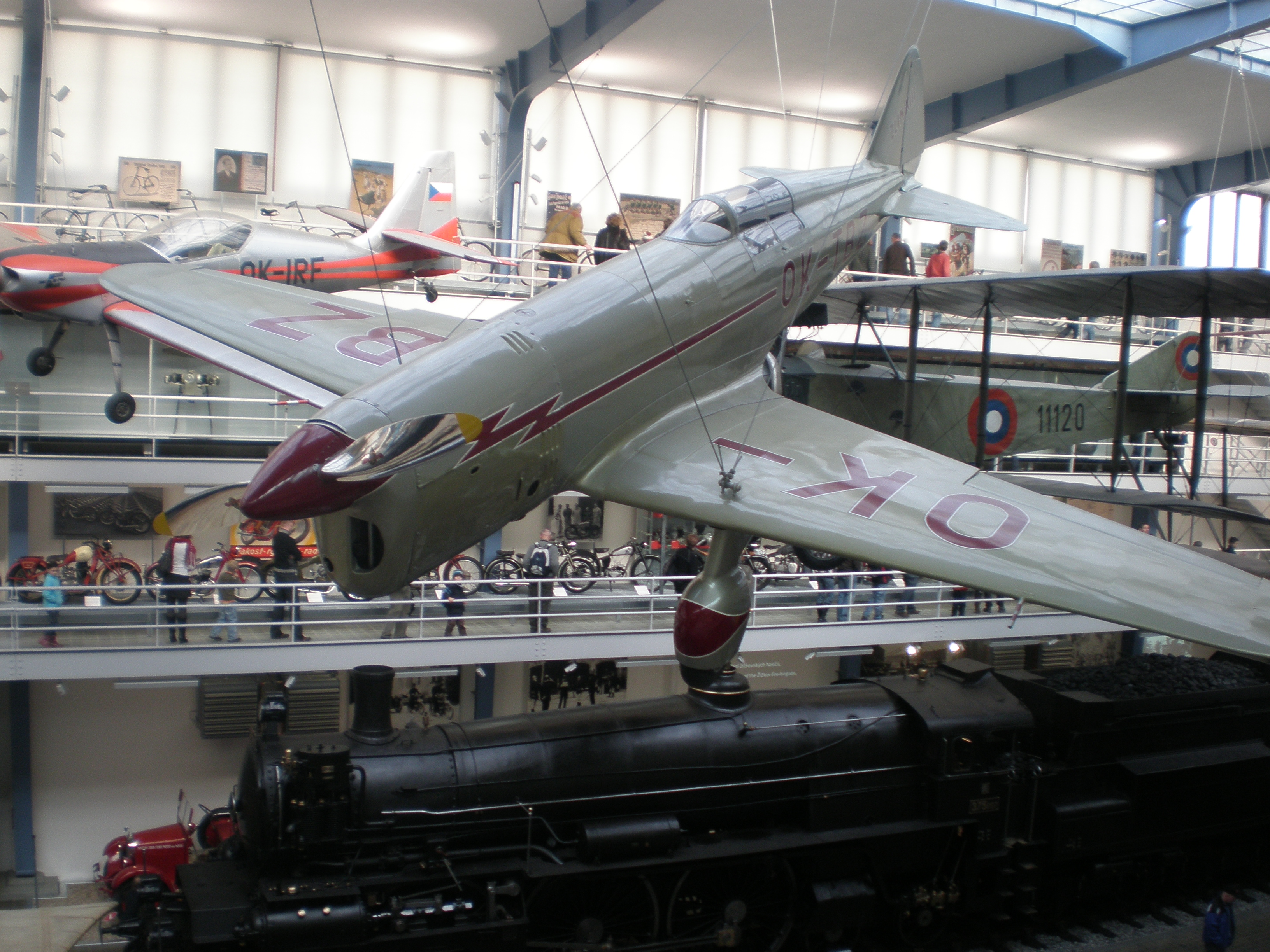 letadlo; Zlin XIII